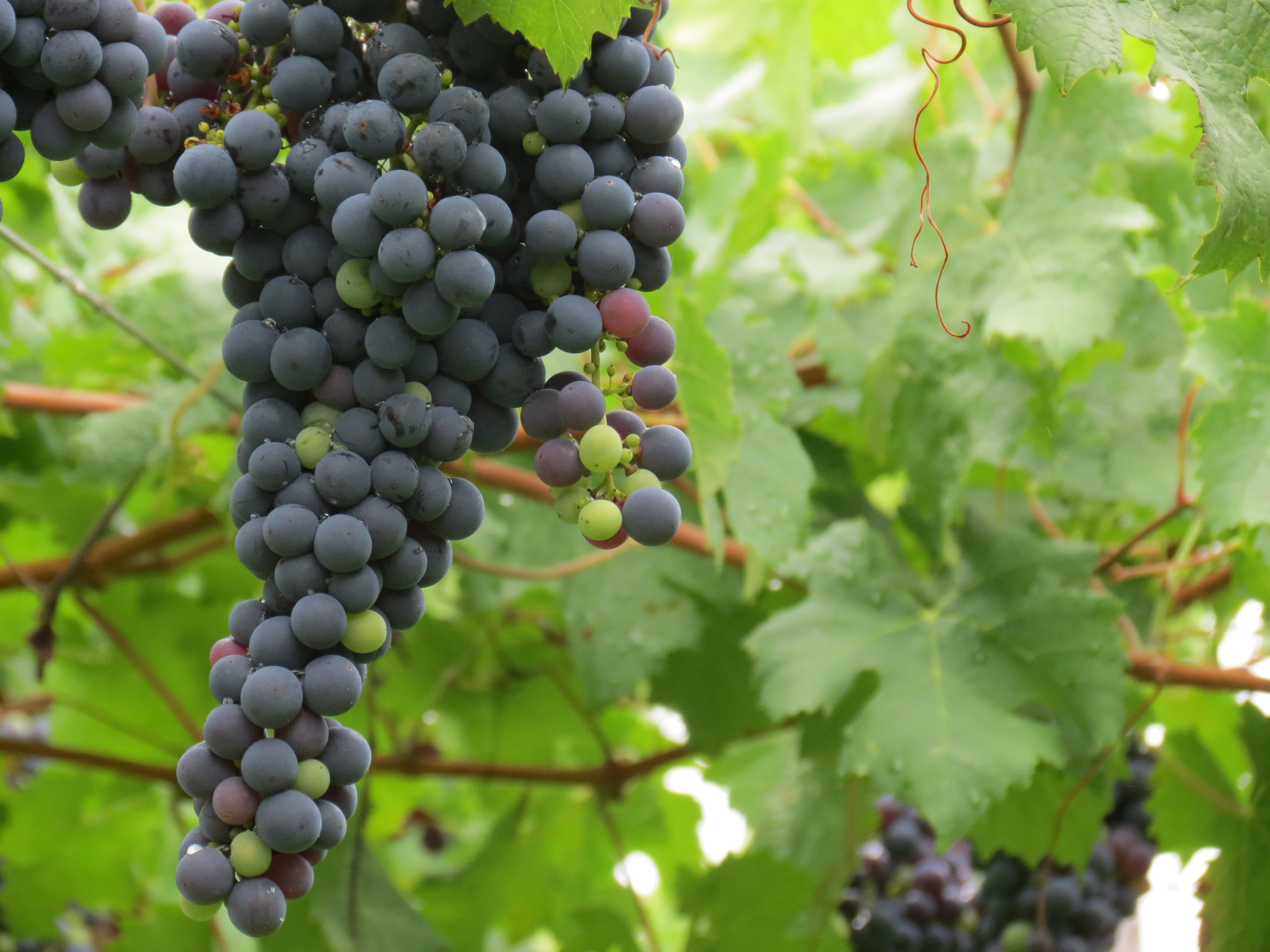 Vale dos Vinhedos - Bento Gonçalves - RS - Essa foto foi obtida com a busca por um perfeito cacho de uvas em meio aos parreirais no Vale dos Vinhedos em Bento Gonçalves.